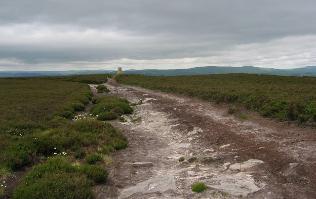 Long Crag